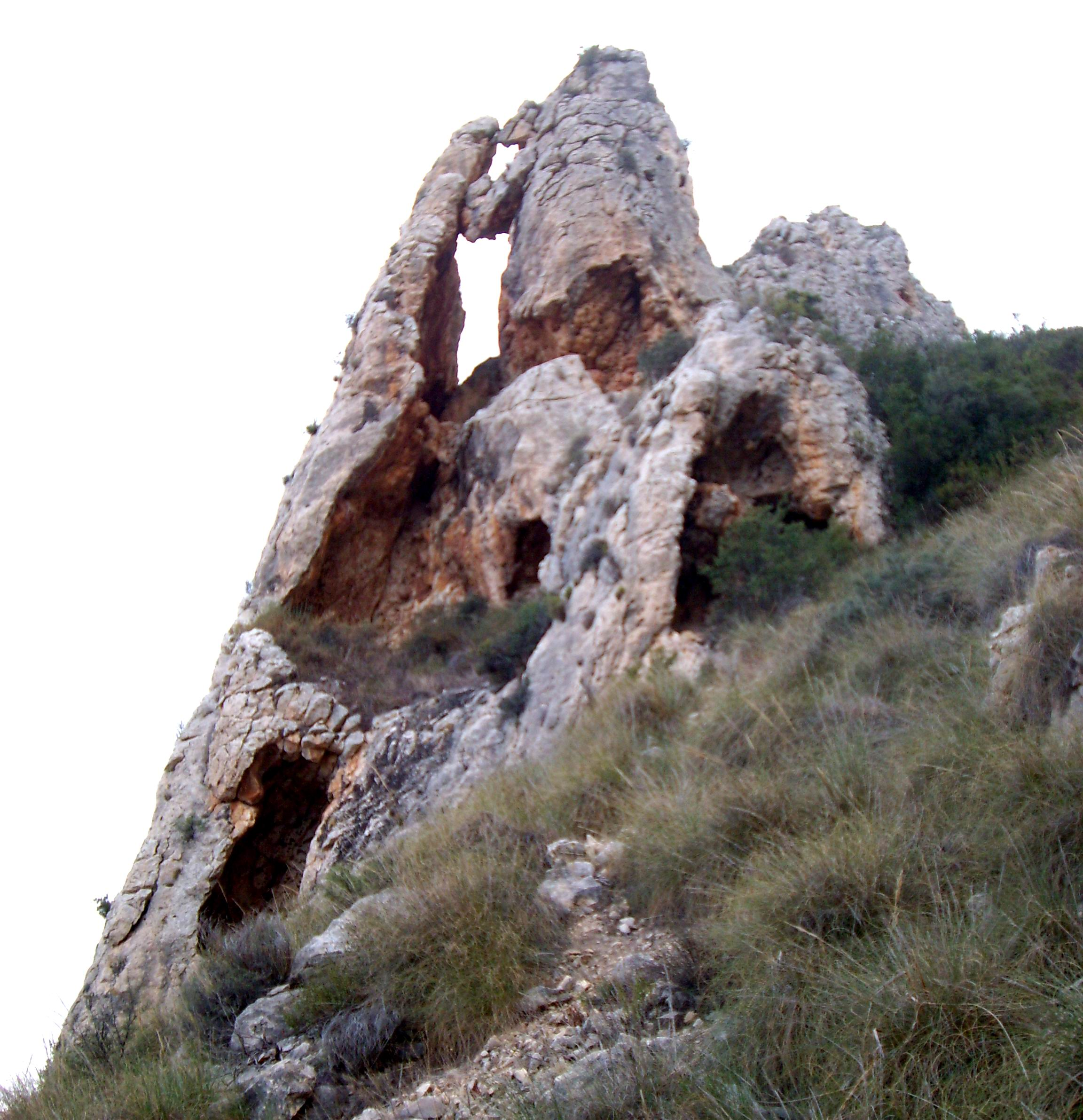 Peñón del Trinitario, en Bolón, Elda.